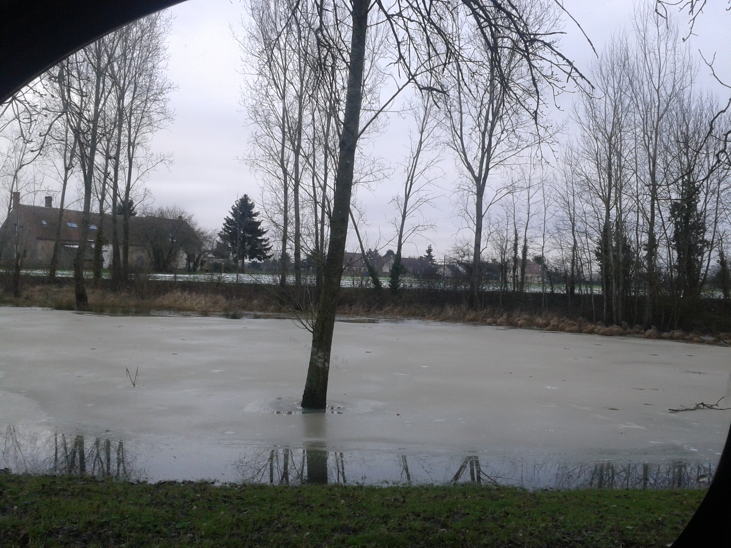 Janvier 2013, la Marmagne à Babile, commune de Férolles. Vue vers l'O-N-O. La Marmagne est un affluent de rive droite du Dhuy. (A mi-plan, le blanc est de la neige sur les sillons d'un champ.)